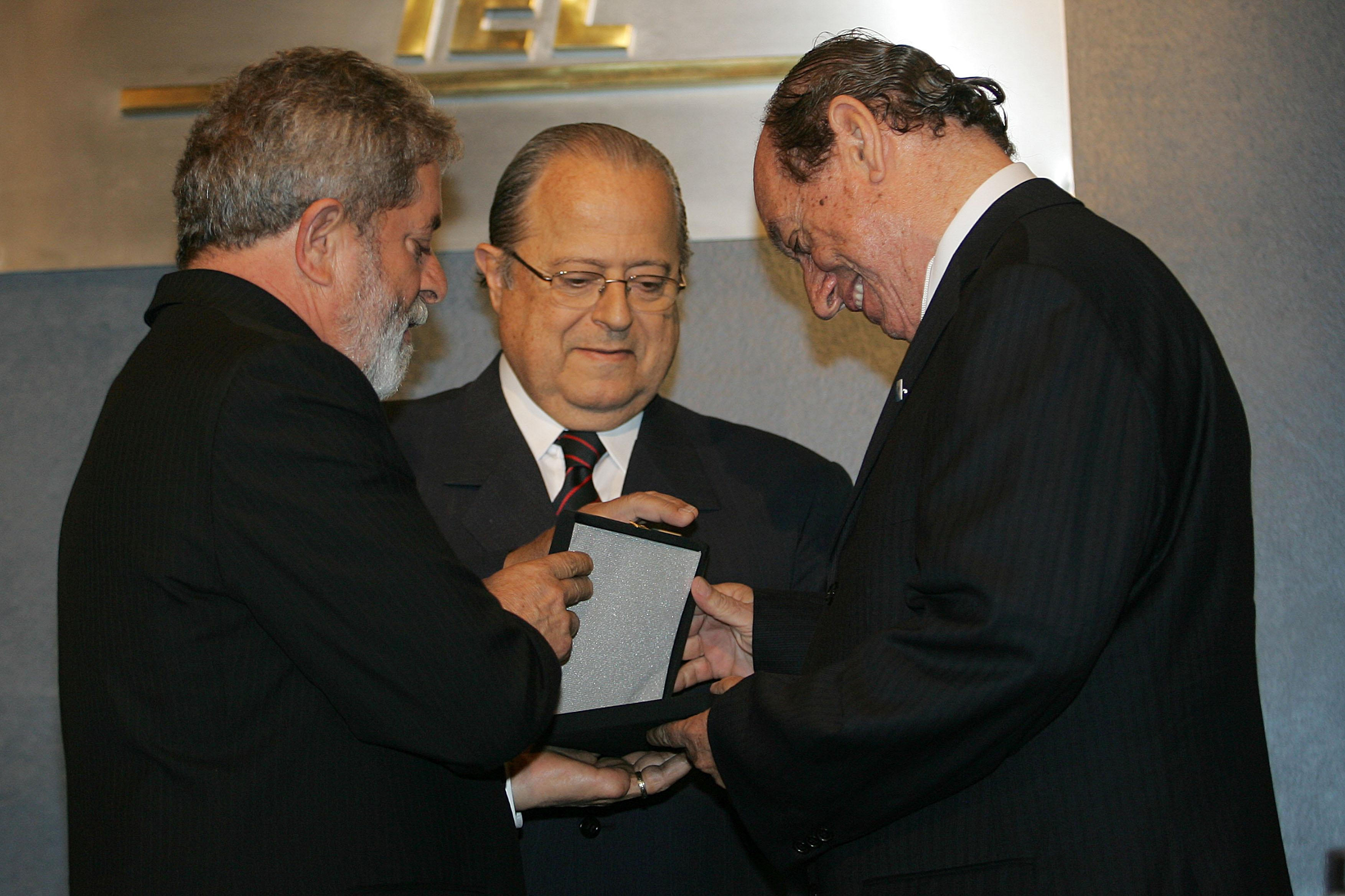 O ex-presidente Luiz Inácio Lula da Silva homenageia durante o 1º Encontro Nacional sobre Biocombustível na sede da Confederação Nacional da Indústria (CNI), o engenheiro químico Expedito Parente. Ao centro, o presidente da CNI, Carlos Eduardo Moreira Ferreira.